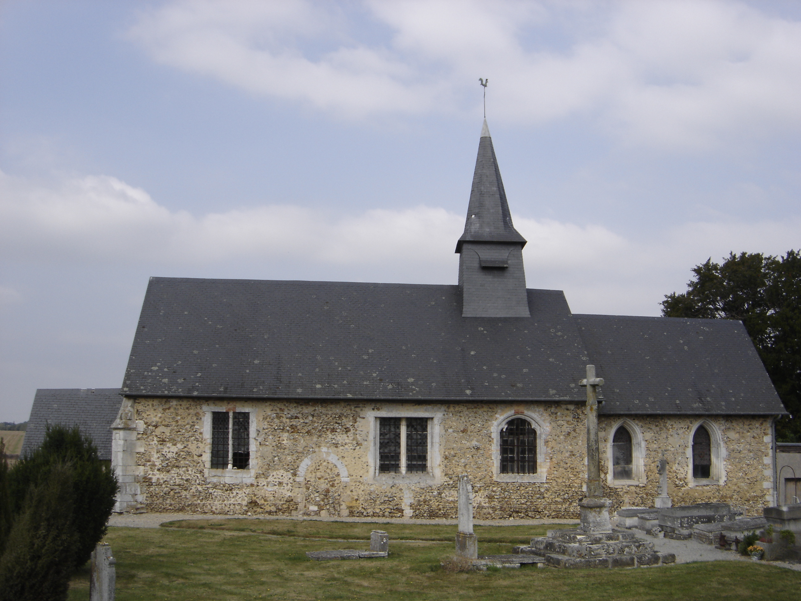 église de Noards - Eure - France